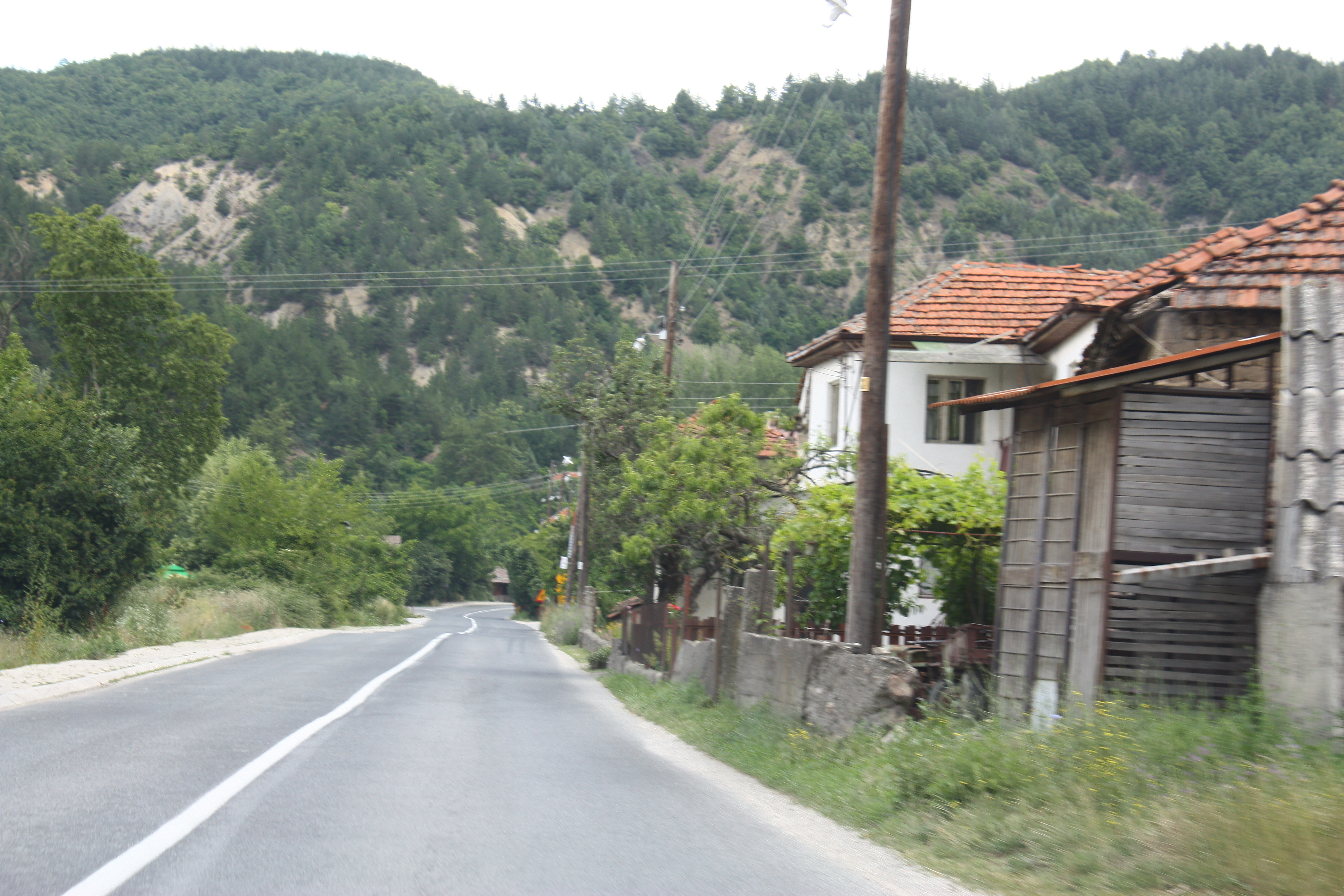 Kosel, Macedonia